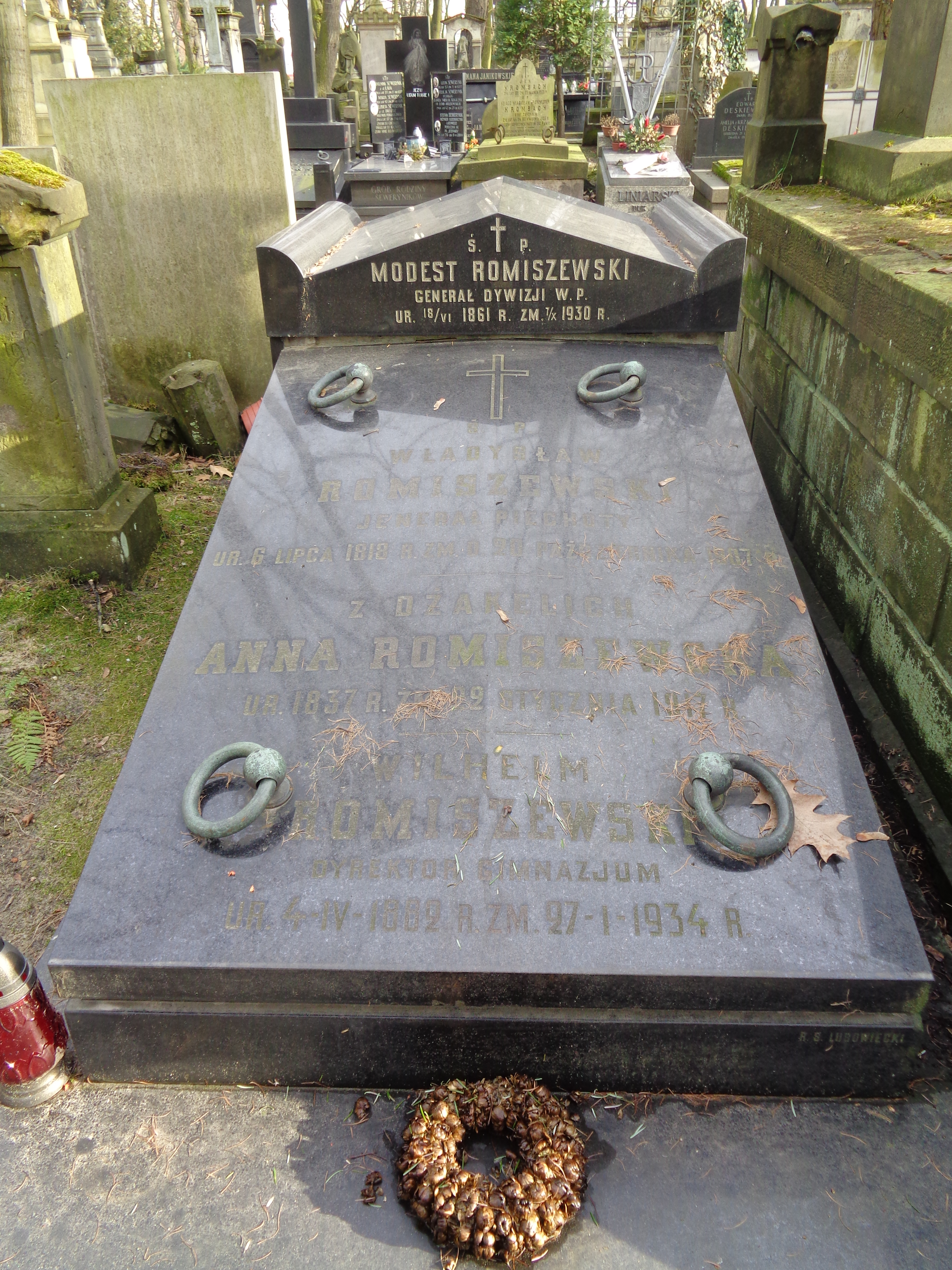 Grób Modesta Romiszewskiego na cmentarzu powązkowskim